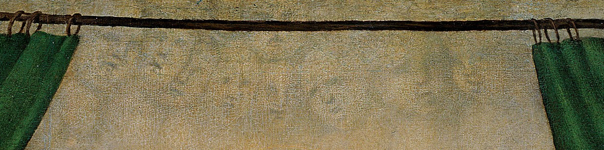 Aus Engelsköpfen gebildete Wolken im Hintergrund von Raffaels Sixtinischer Madonna